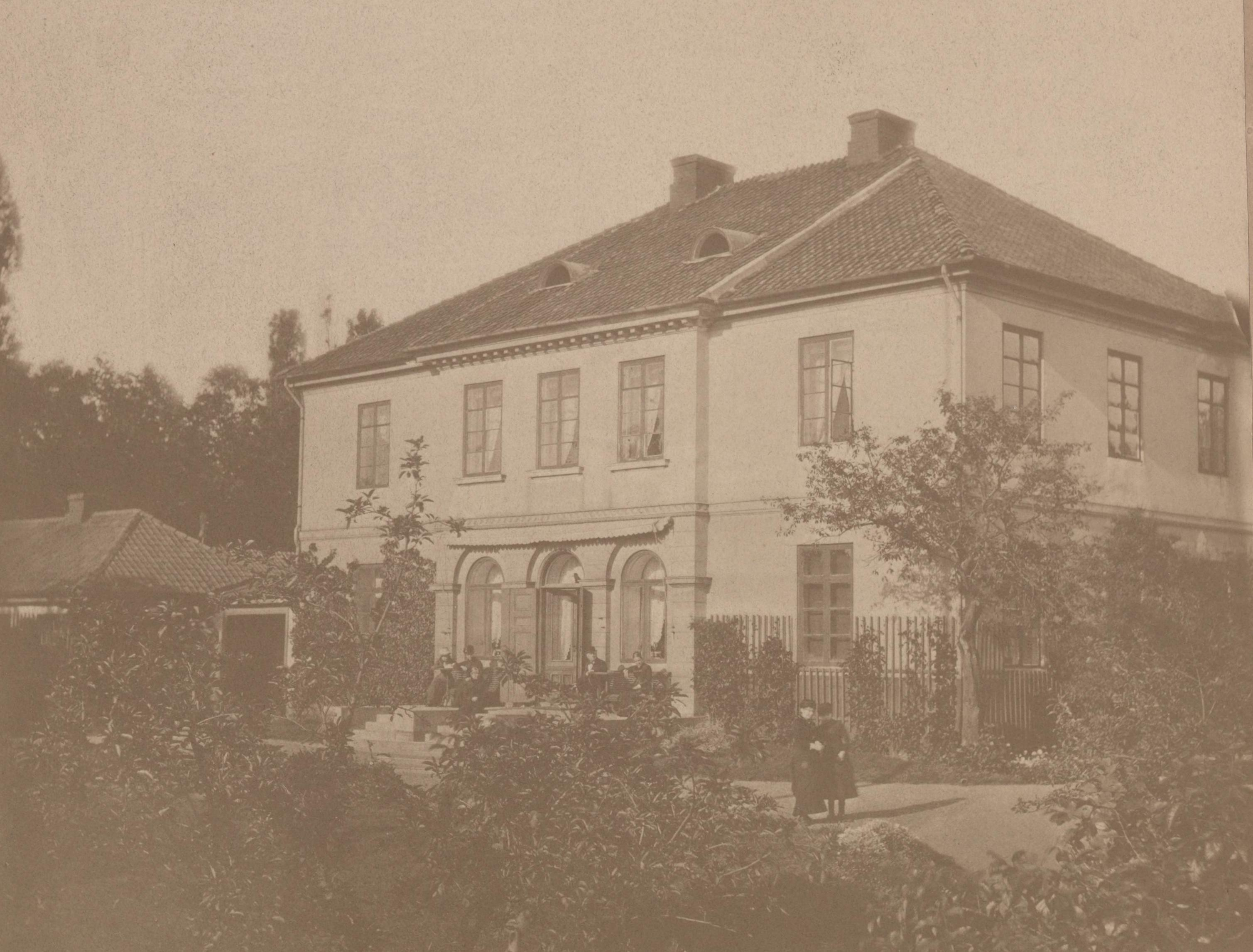 Bildet er hentet fra Nasjonalbibliotekets bildesamling. Anmerkninger til bildet var: Tittel hentet fra påskrift på komponentnr 1. Løkken Solli, tidligere løkkeeiendom på Drammensveien i Oslo.